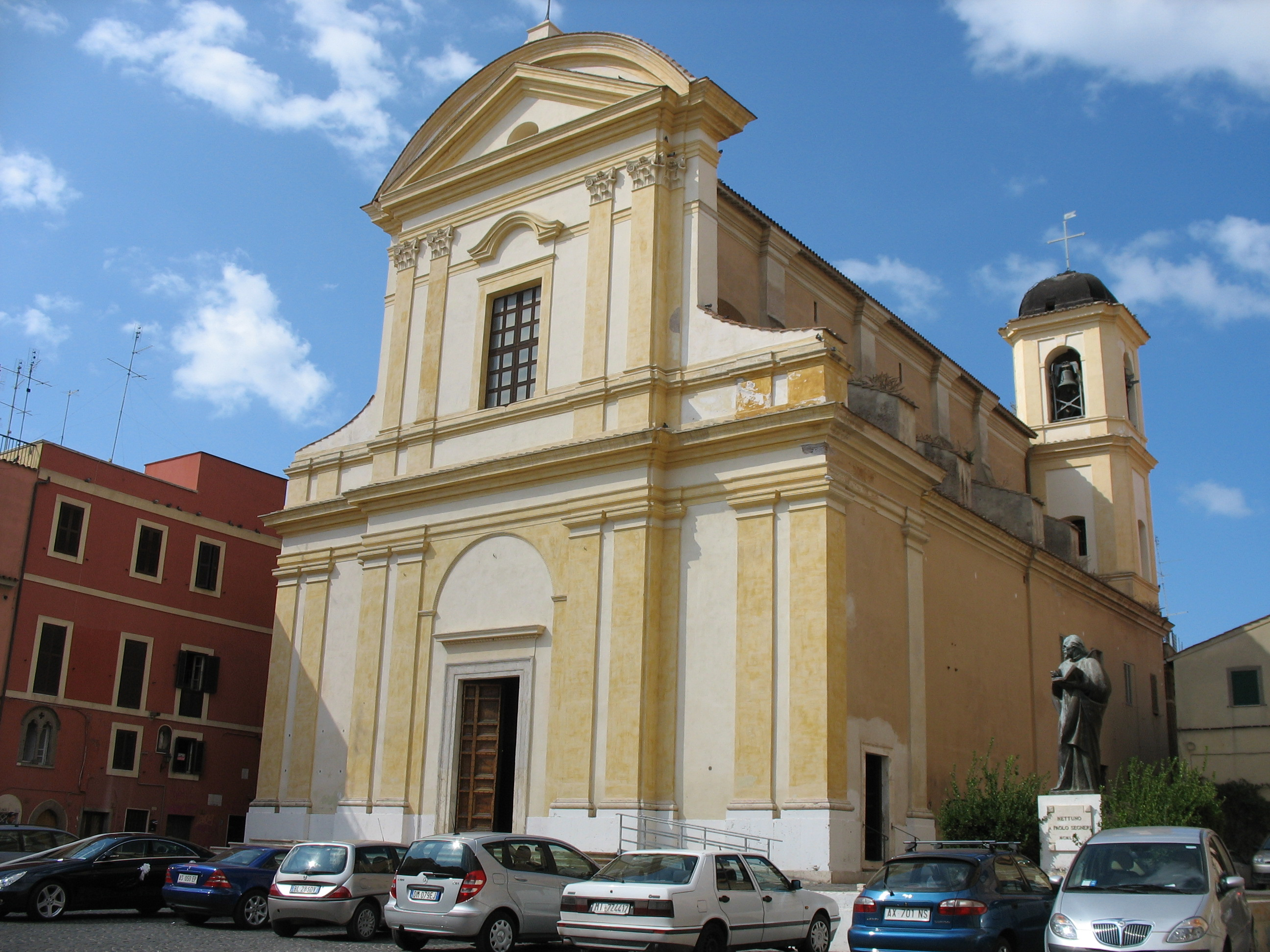 Stefano, Chiesa di San Giovanni, a Nettuno (prov. di Roma).